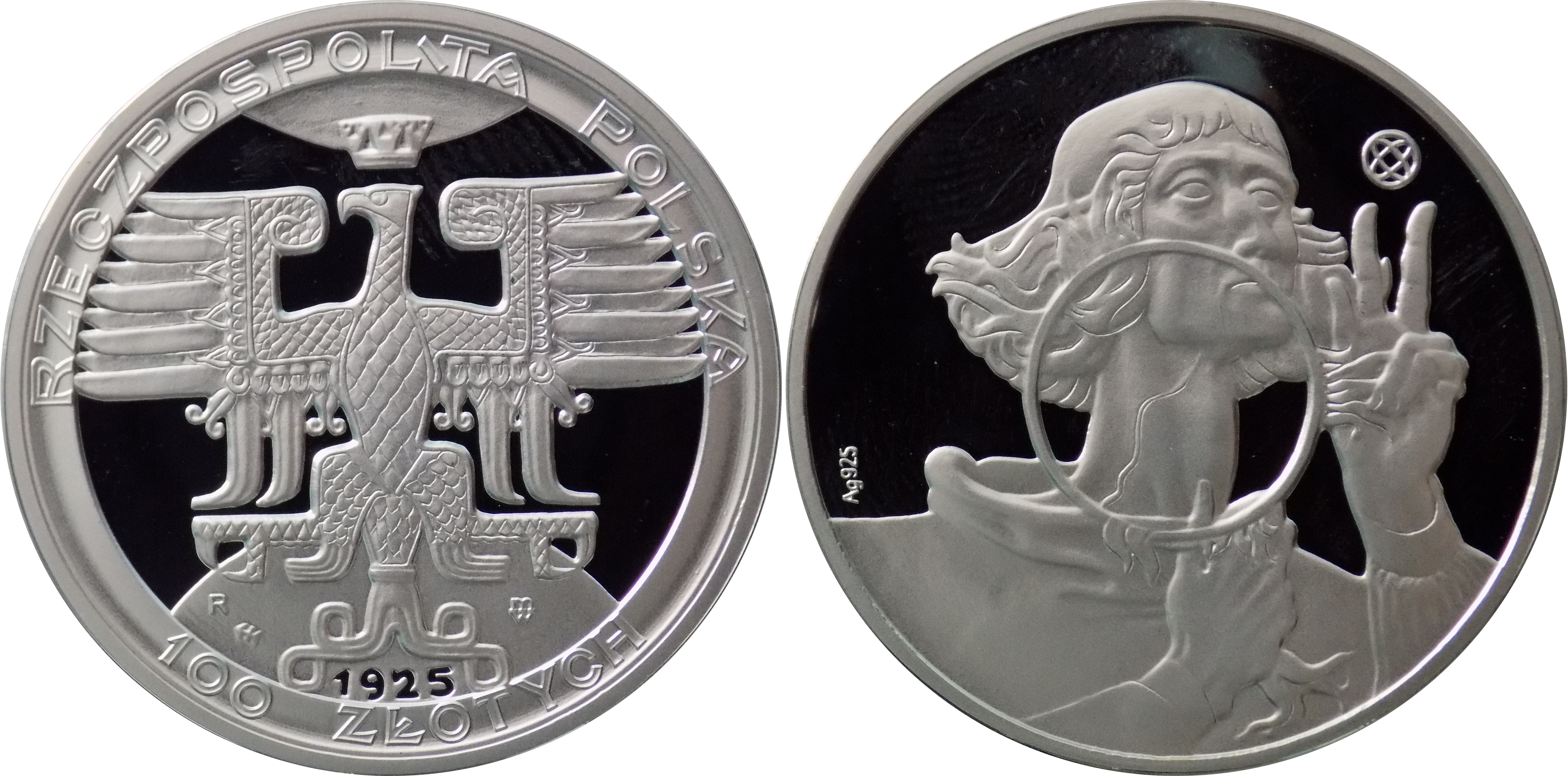 Replika MW 100 złotych 1925 Mikołaj Kopernik 35mm srebro